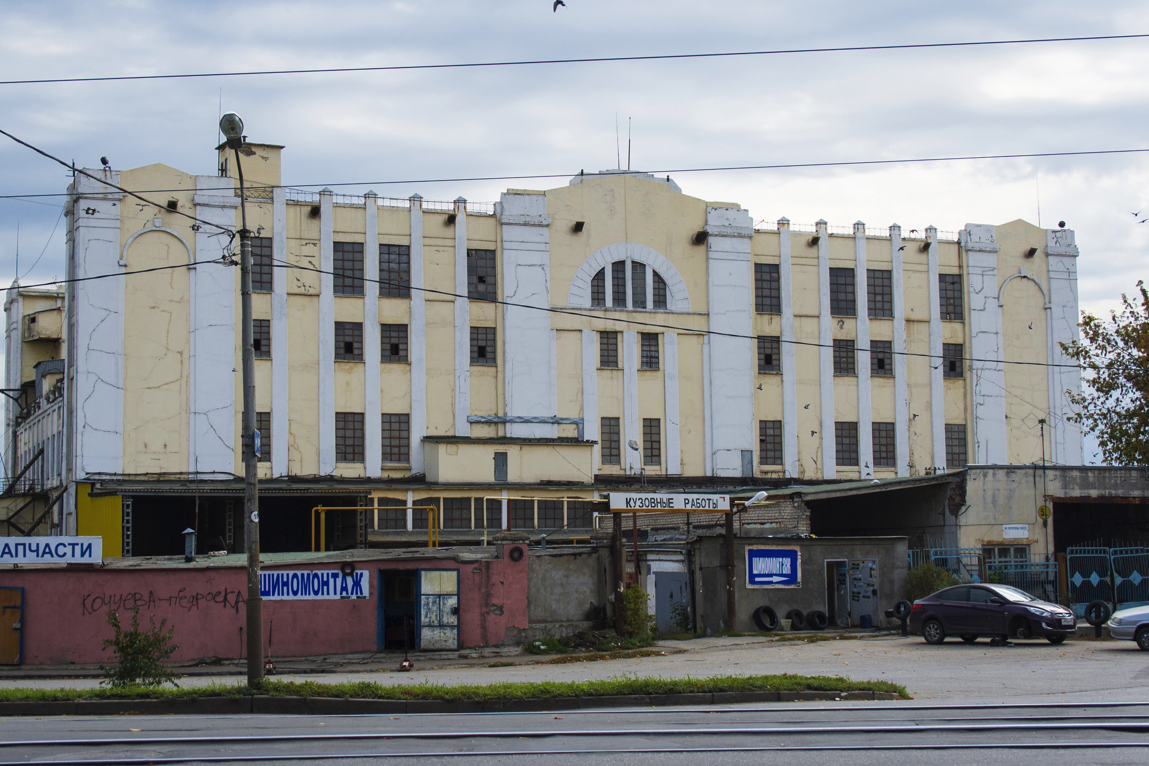 Самый доступный ракурс.